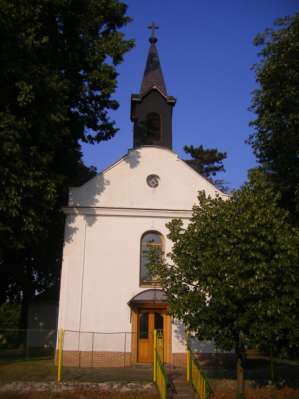 Kóvár - katolikus templom